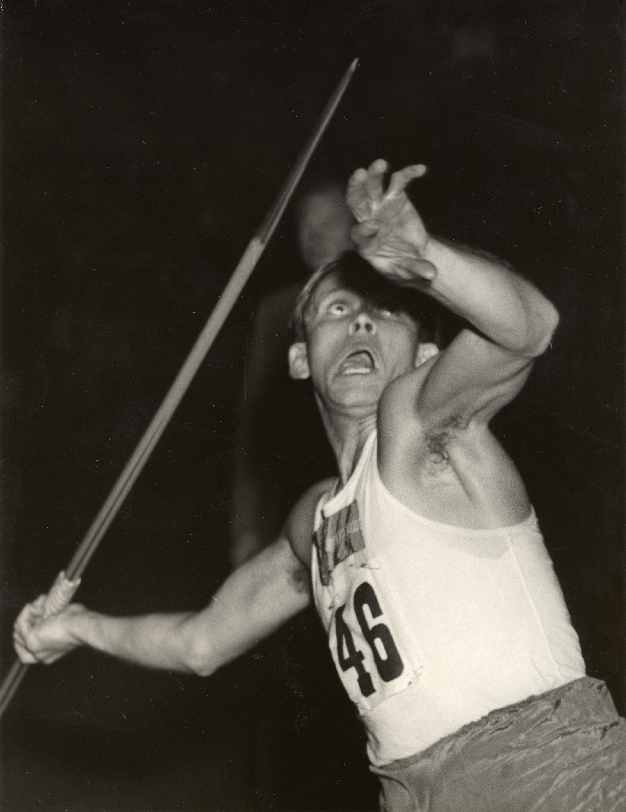 Otto Bengtsson